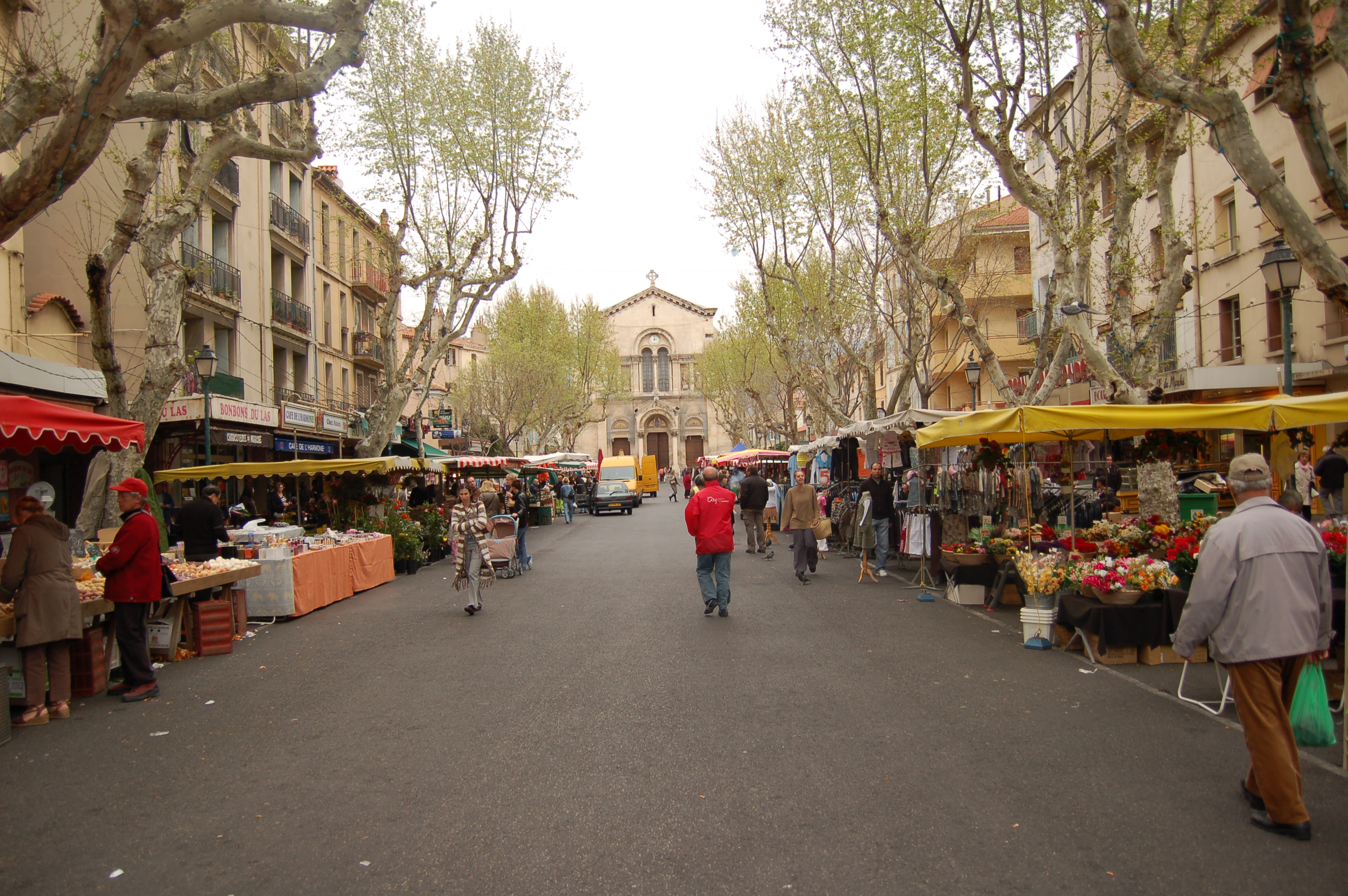 Marché à Toulon Pris à Toulon (France) Avril 2007